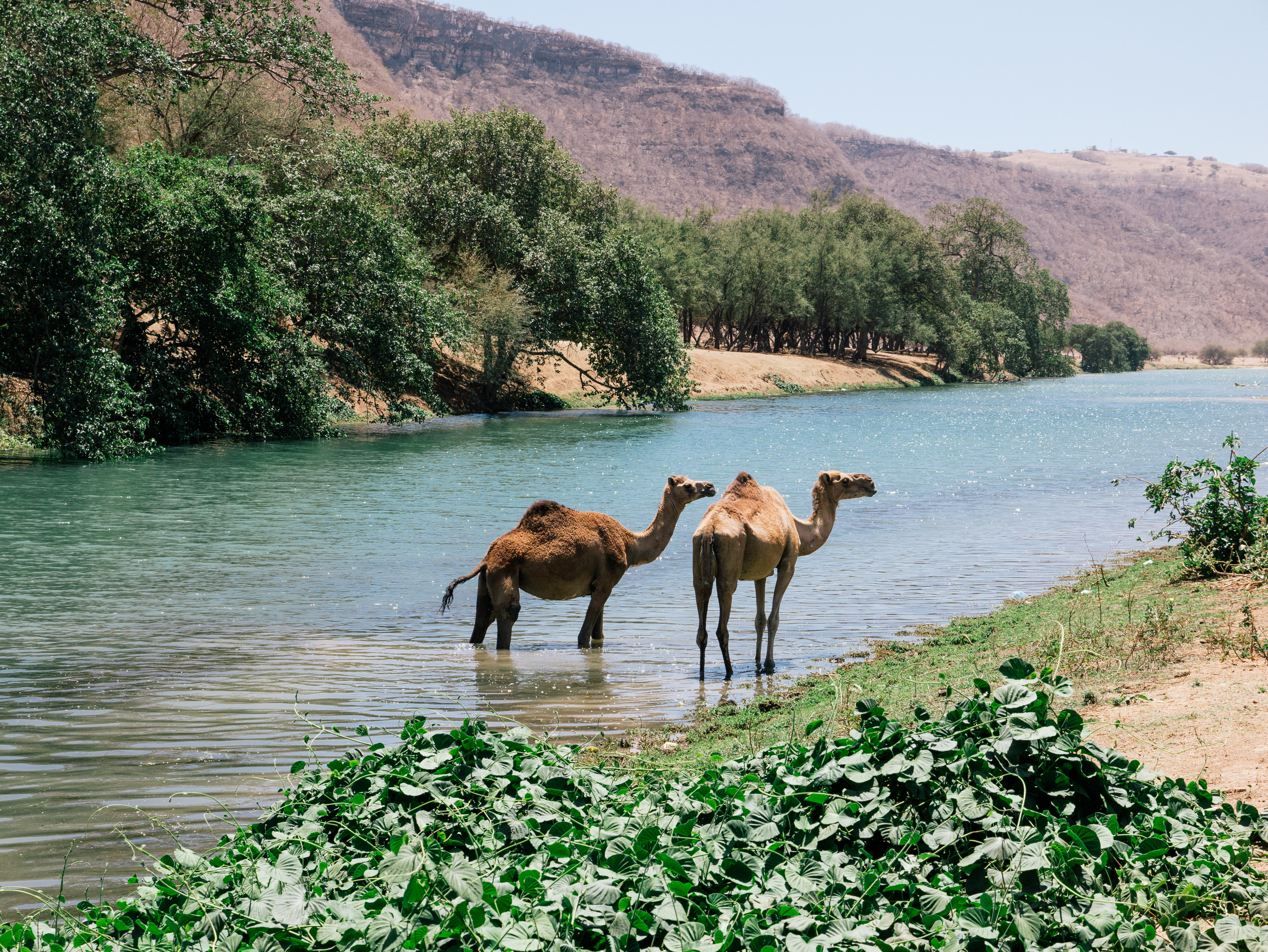 Dhofar, Oman.